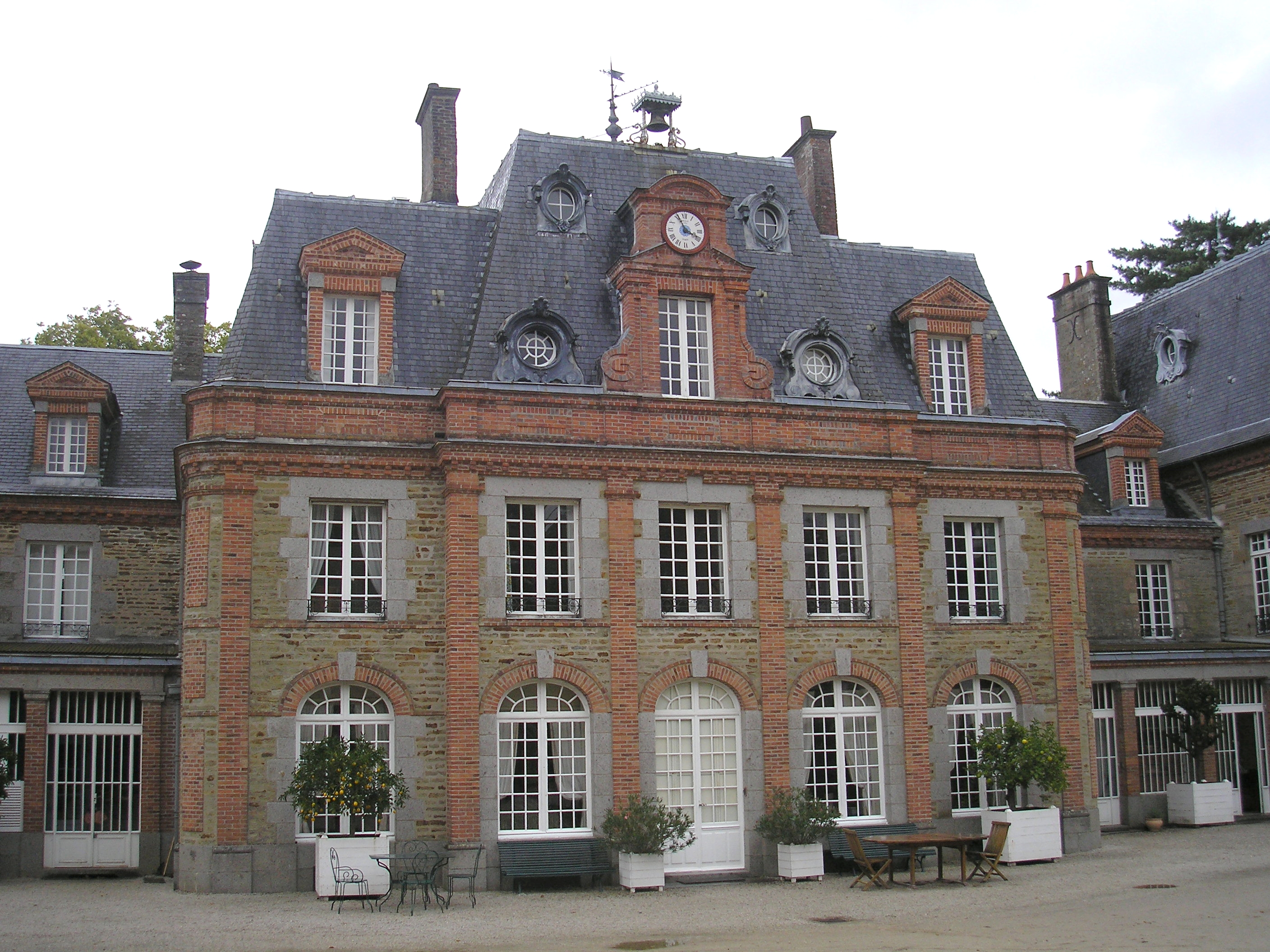 Thubœuf (Pays de la Loire, France). Façade sud du château de Chantepie.